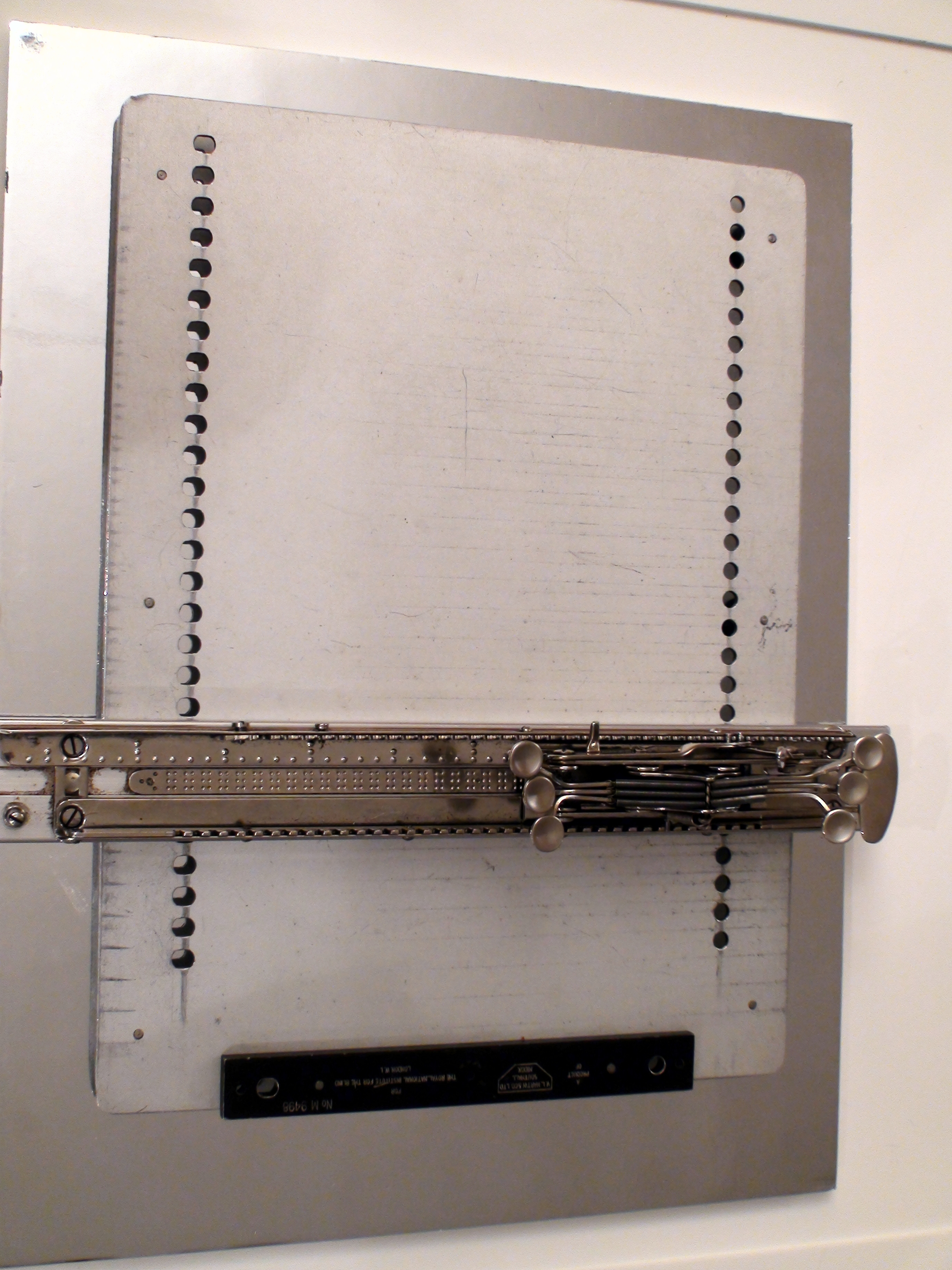 Máquina Stainsby, para escreitura en braille.